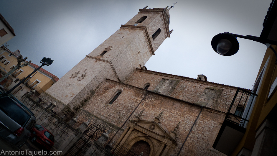 Las fotos que vas a ver a continuación corresponden a la torre y al campanario de la iglesia. No he podido encontrar apenas documentación al respecto. Puedes ver la entrada completa en